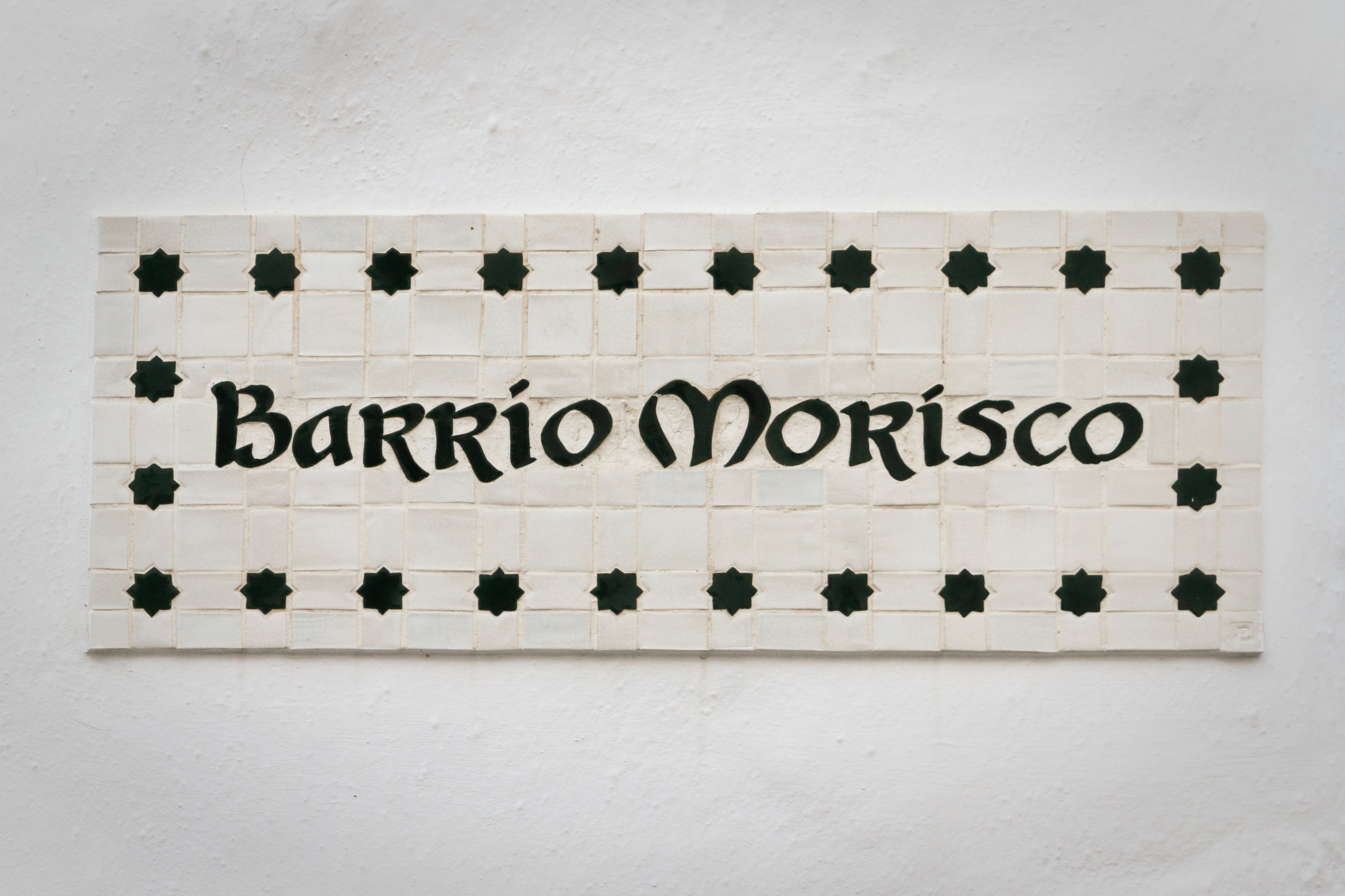 Frigiliana